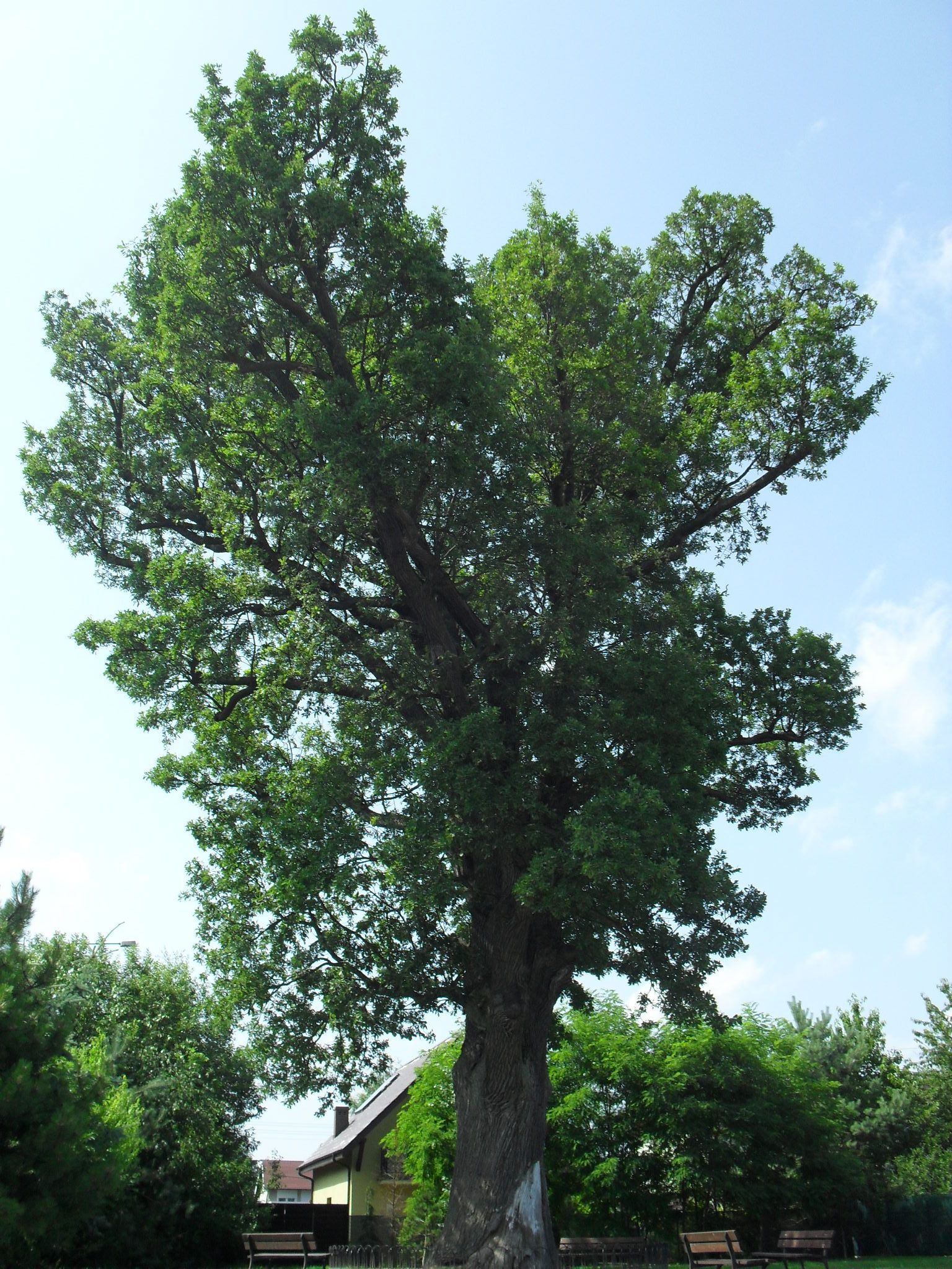 Drugi co do obwodu dąb w Bydgoszczy przy ul. Głębinowej 13. Obwód na rok 2011 - 590 cm.